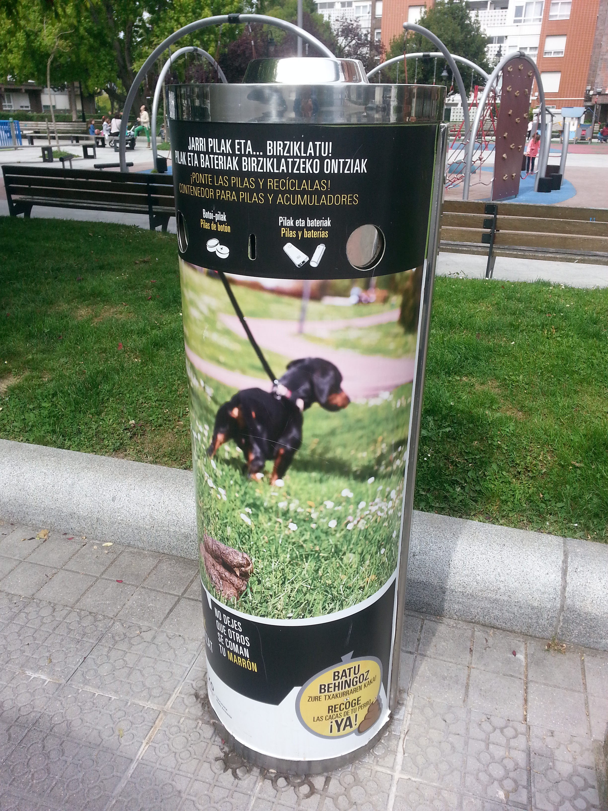 Zazpigarren edukiontzia Getxon, pila eta bateriak batzeko. (Txakurren jabeei gorotzekin kontuz ibiltzeko oharrekin).